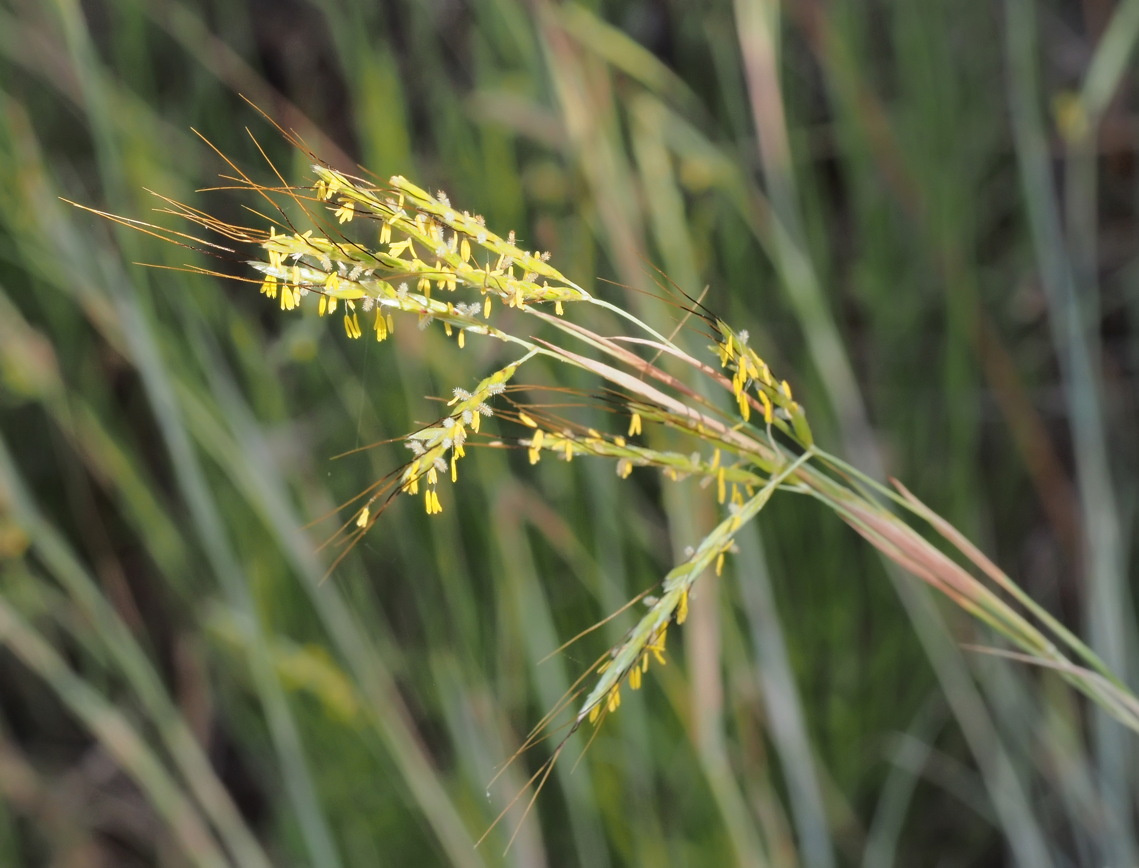 Hyparrhenia hirta. Losar de la Vera (Cáceres, España).